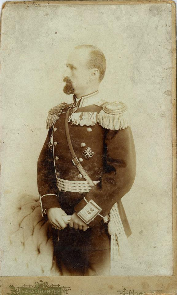 Иван Цончев